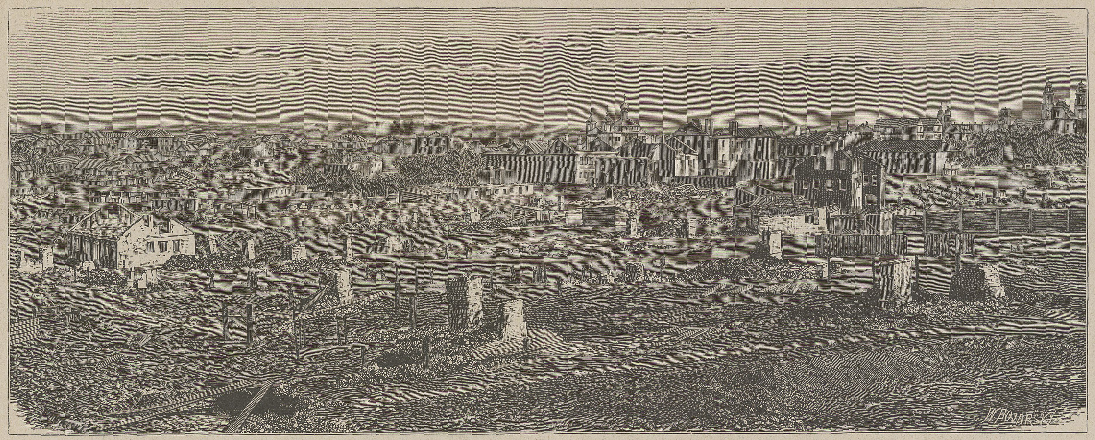 Беларуская (тарашкевіца): Менск (Miensk). Панарама Раманаўскай Слабады (Ramanaŭskaja Słabada) па вялікім пажары, направа удалечыні Ракаўскае прадмесьце, Нізкі і Высокі Рынкі